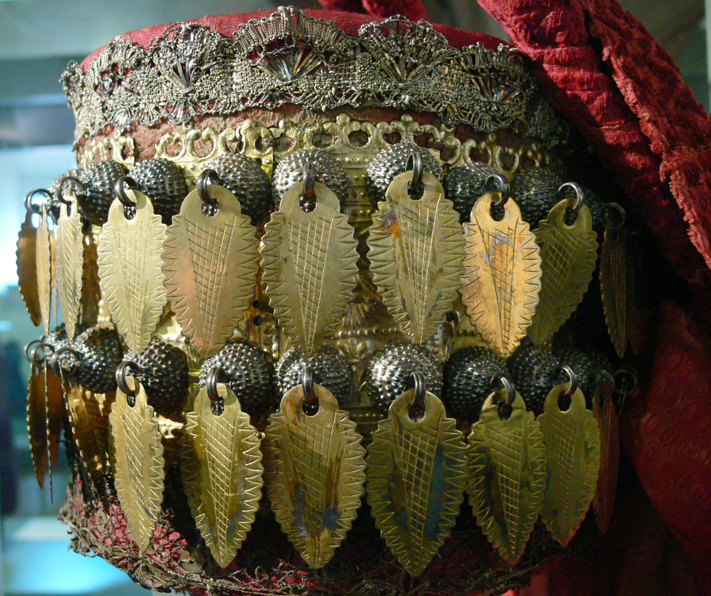 Museum für Thüringer Volkskunde, Erfurt